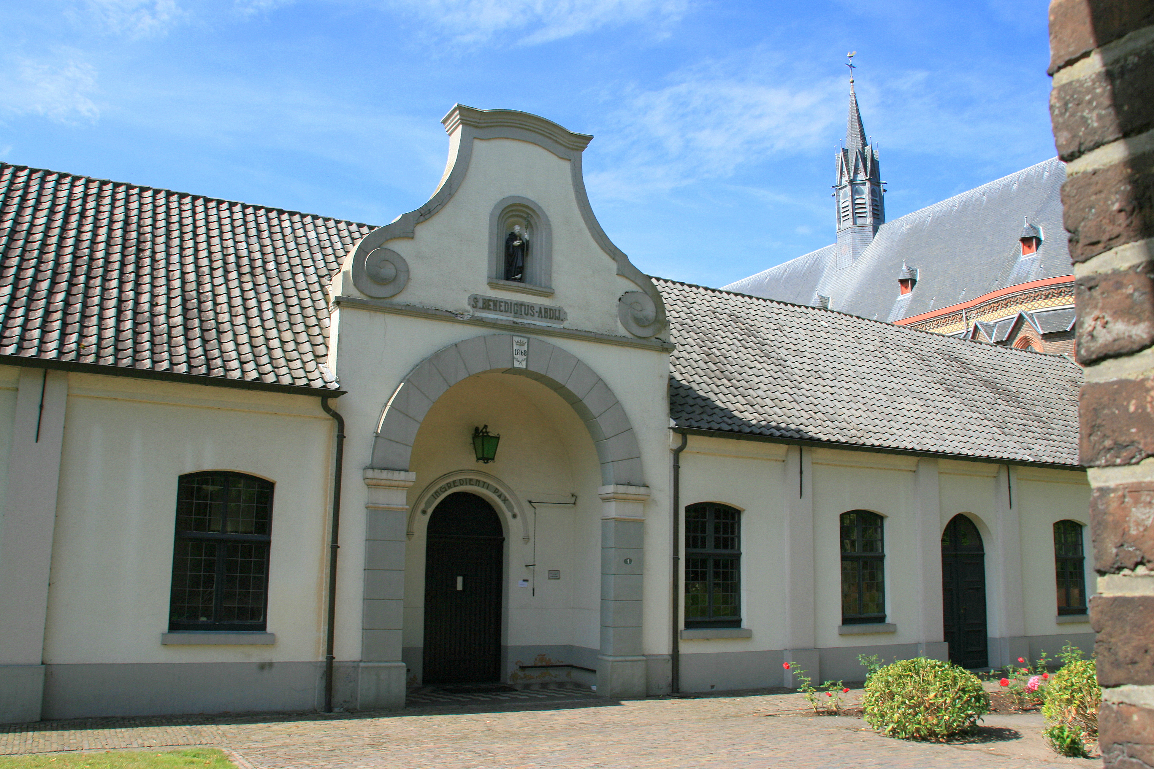 De abdij is niet te bezichtigen en de abdijkerk is alleen toegankelijk om de liturgische vieringen bij te wonen. Naast de ingang van het gastenhuis in de voorhof is een mooie onthaalkapel, die voor iedereen toegankelijk is.